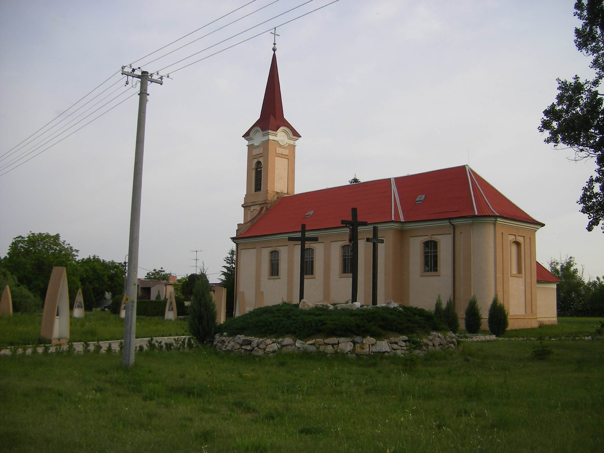 Ímely - katolikus templom